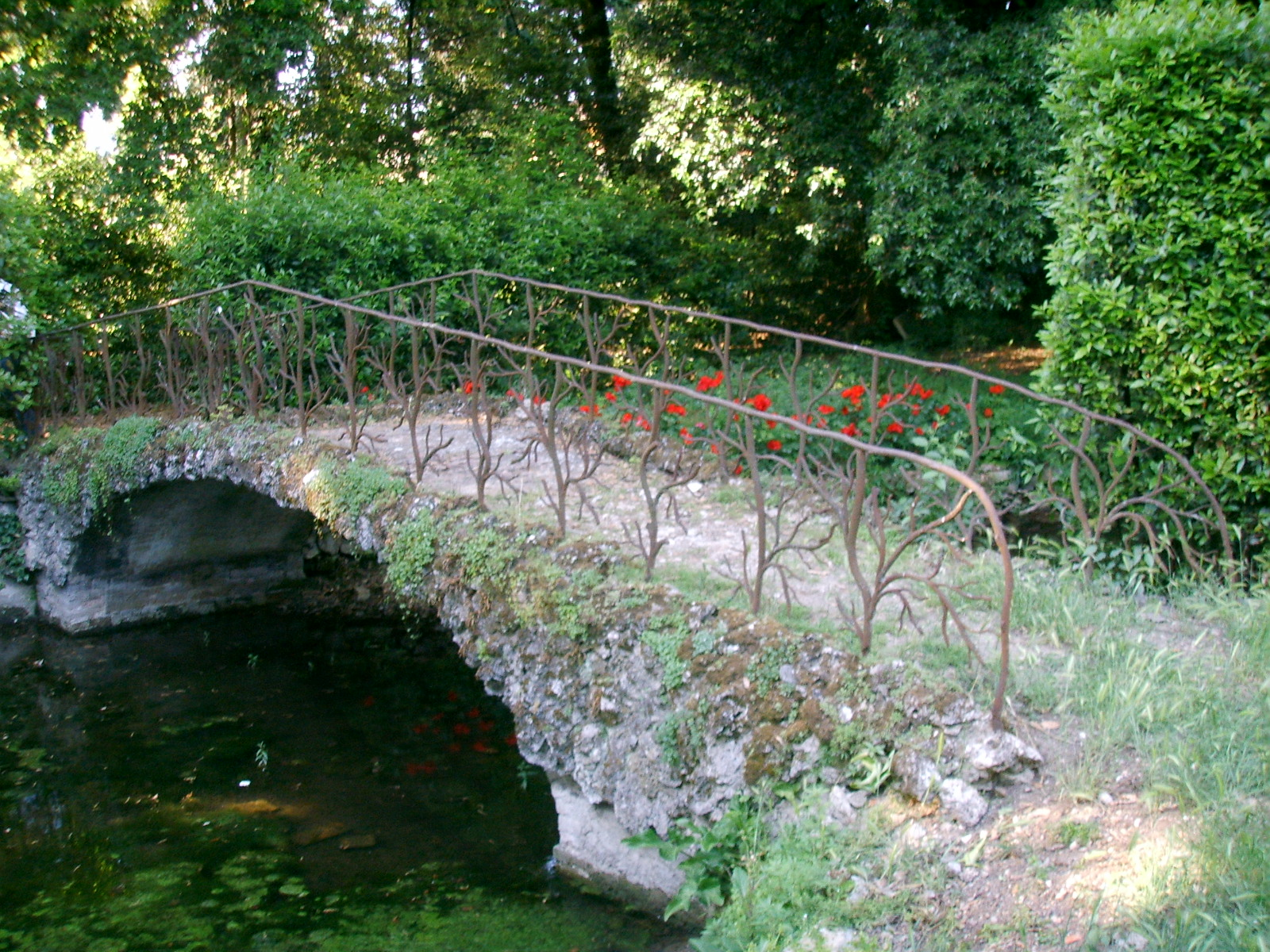 Villa guicciardini corsi salviati, giardino